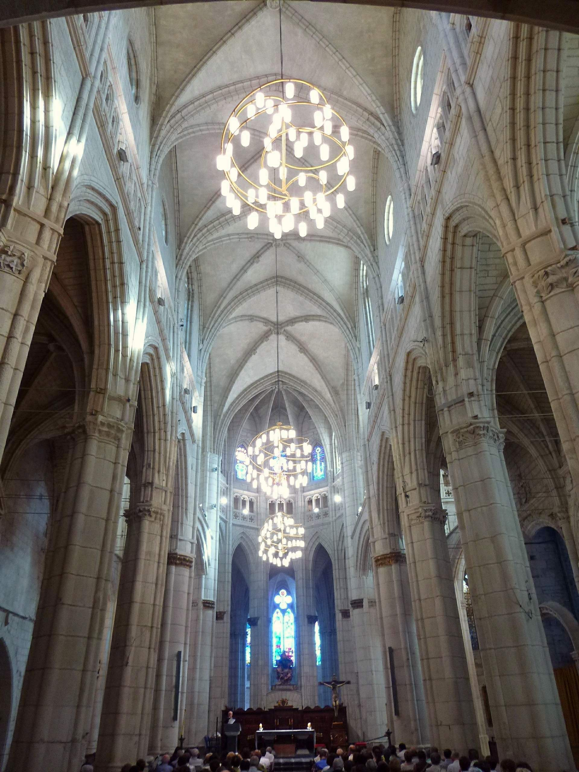 Catedral de Santa María, Vitoria-Gasteiz